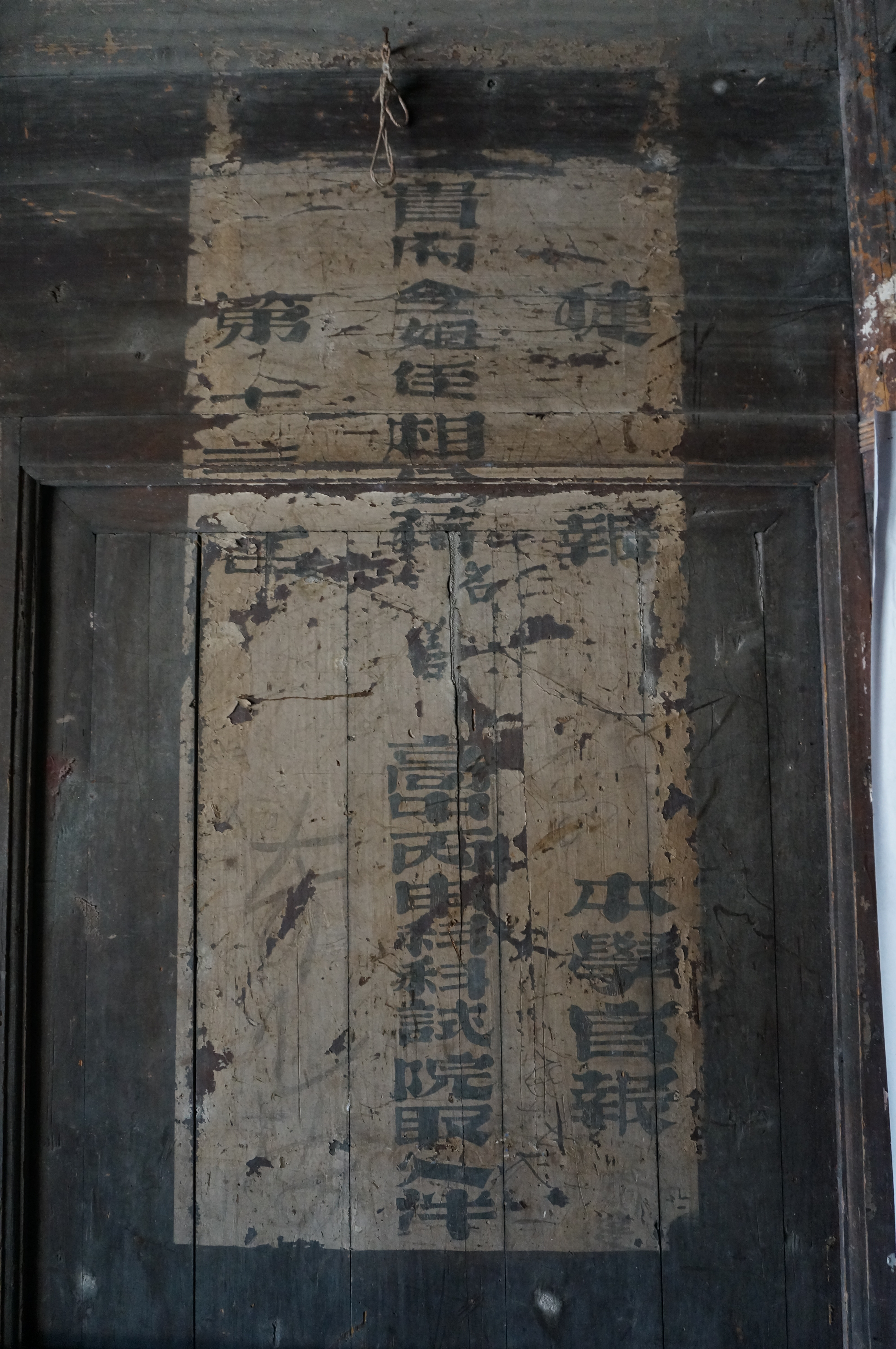 一张捷报，全文为“捷报 本学官报 贵府令姐侄相公花名善高中丙申科科试院取入泮 第十二名”，摄于浙江省象山县西周镇勤丰村。